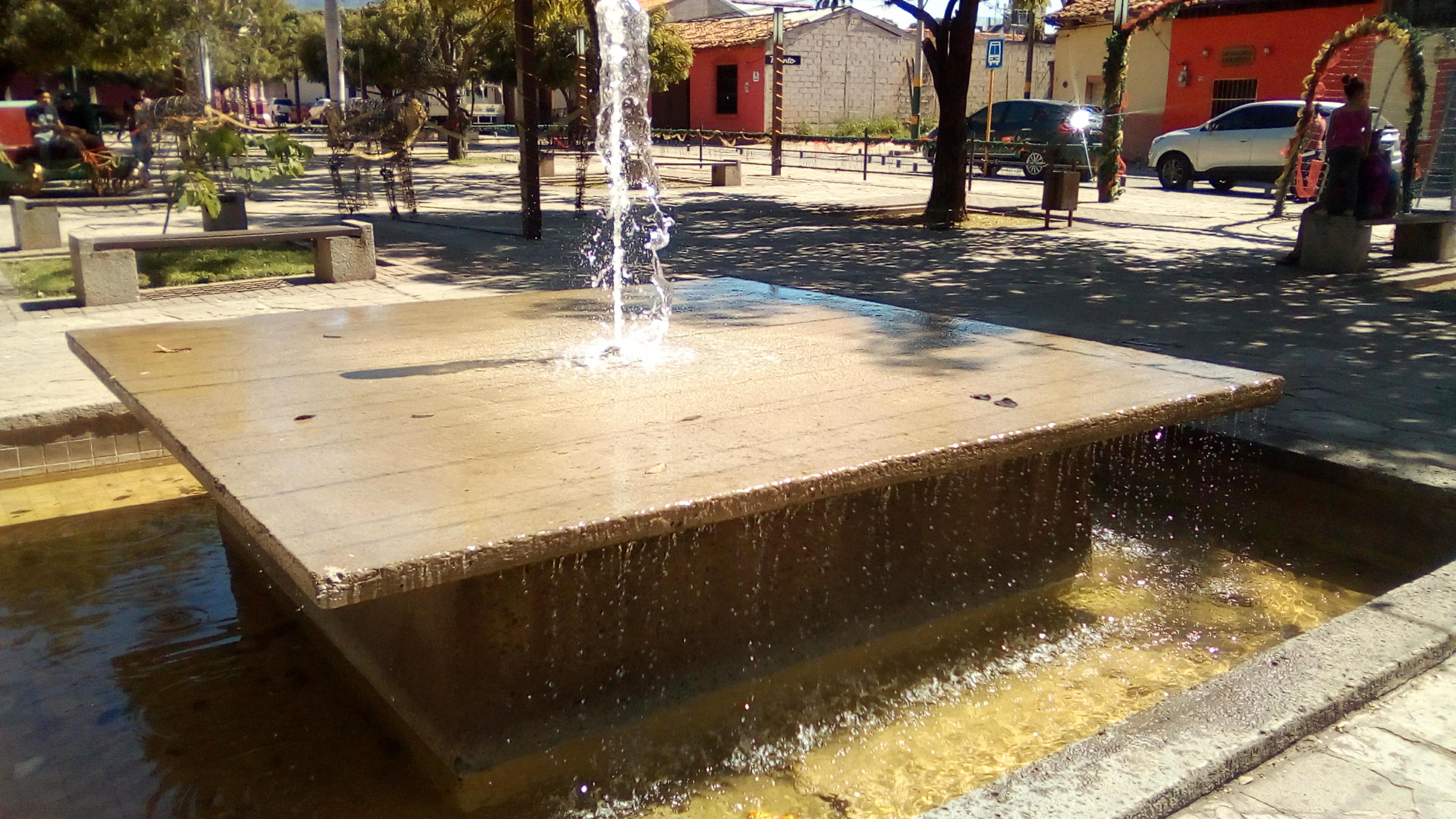 Fuente en la plaza de San Francisco